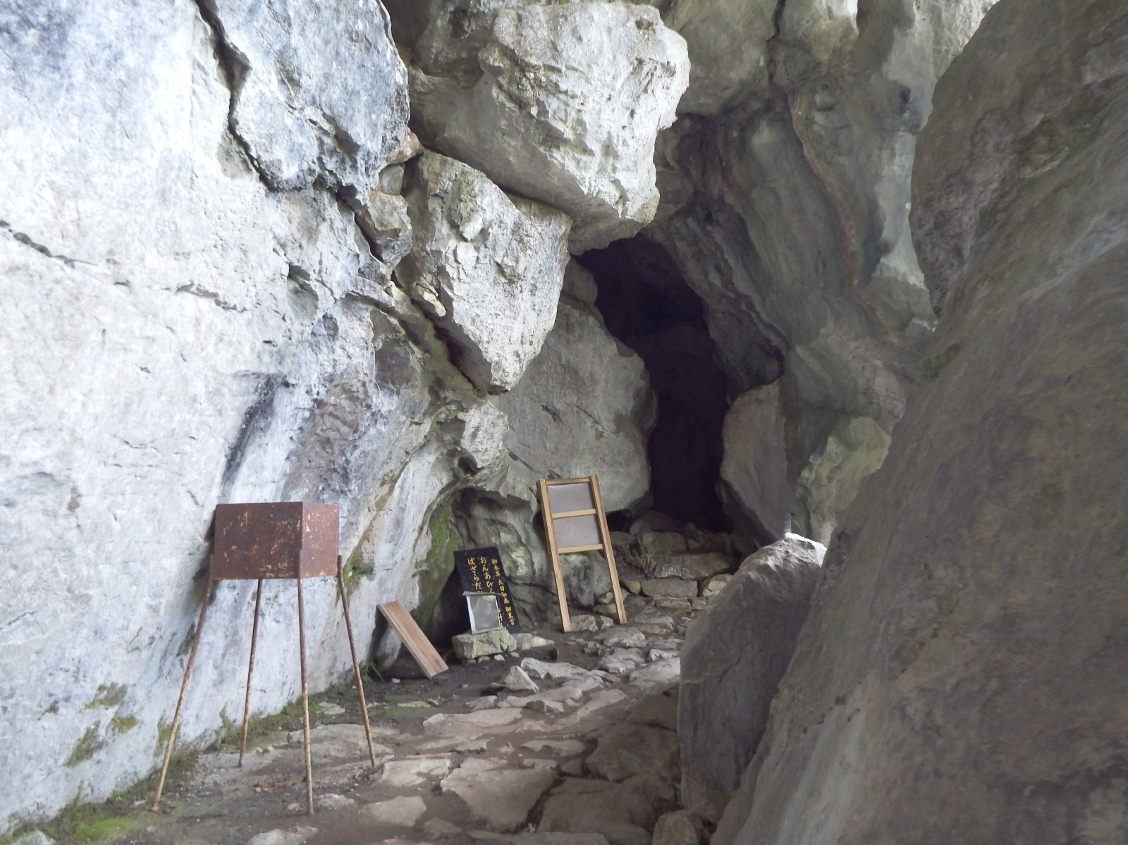 穴禅定の入り口